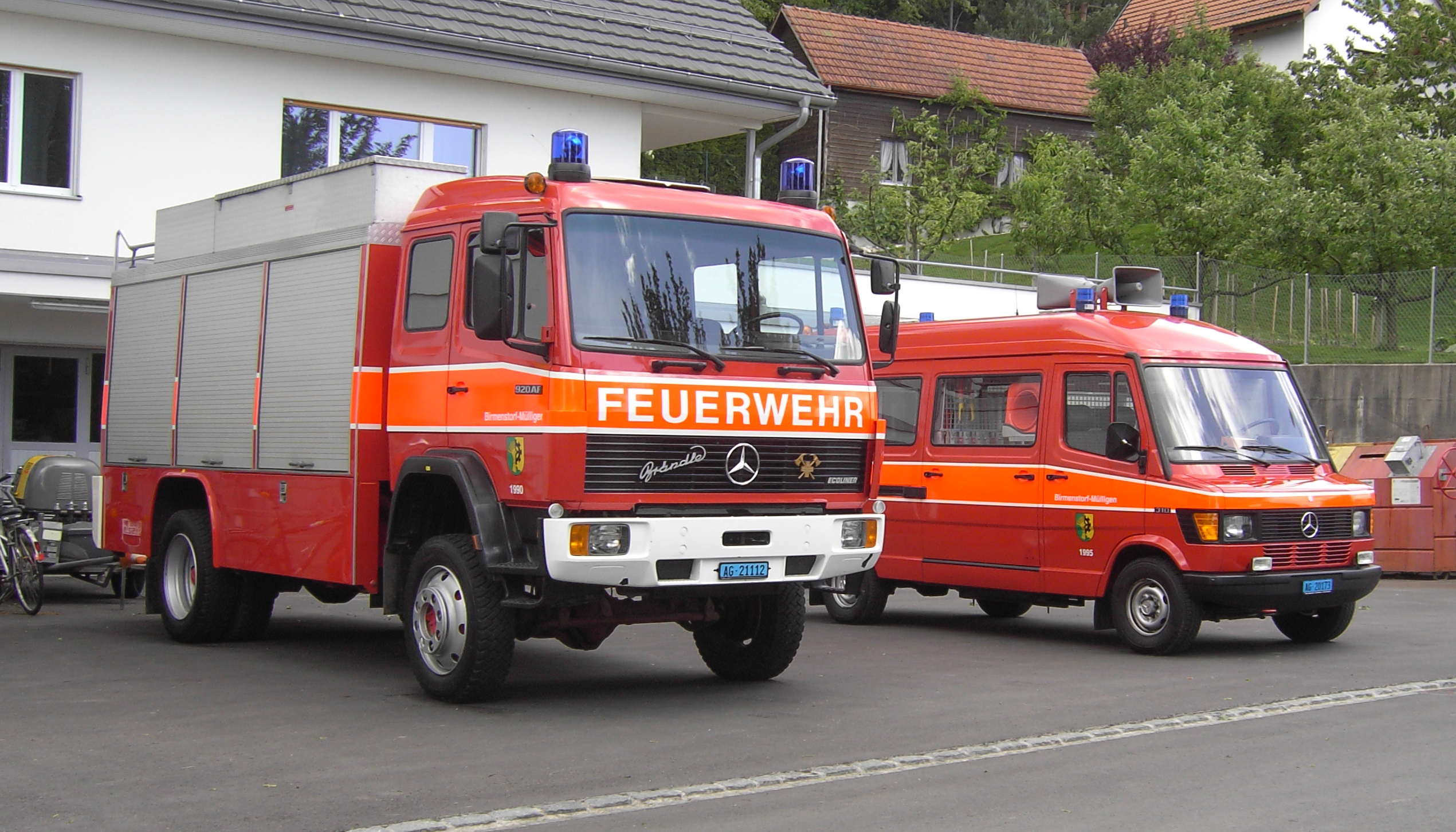 Pikett- und Verkehrsfahrzeug der Feuerwehr Birmenstorf-Mülligen, Schweiz